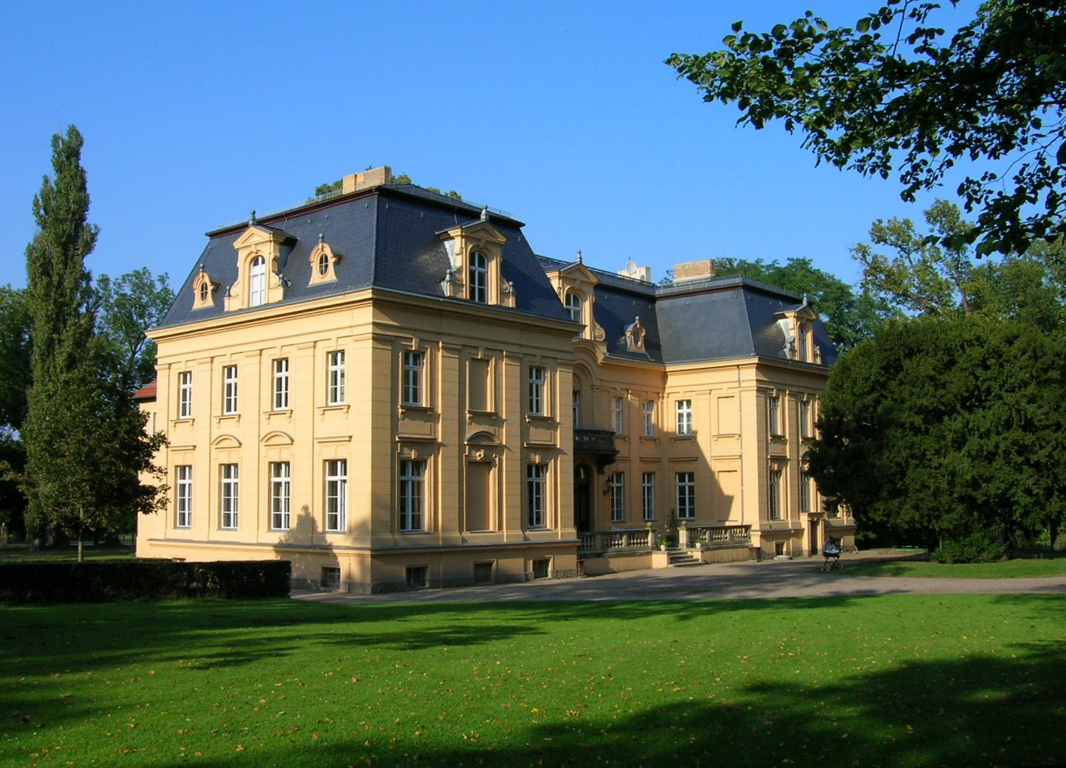 Altranft in Brandenburg, Schloss